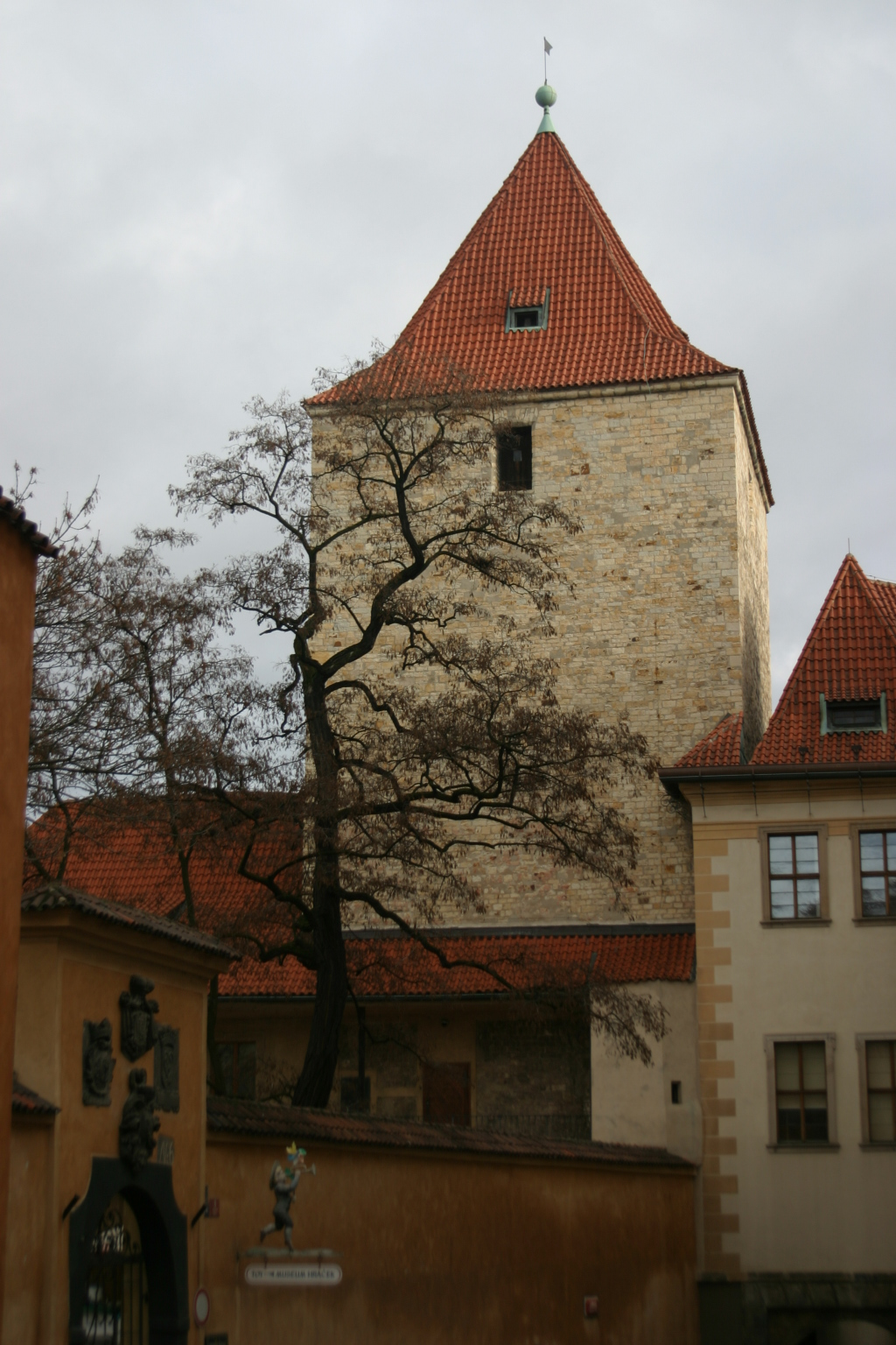 Pražský hrad, Černá věž, pohled z Jiřské